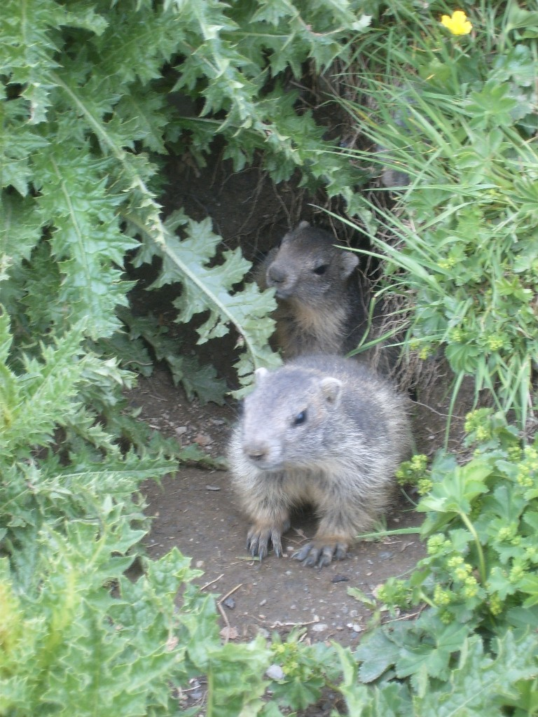 Marmottons au refuge du Col de la Vanoise, juillet 2006. Bel Adone 22 juillet 2006 à 14:03 (CEST) personal picture, I set in public domain.